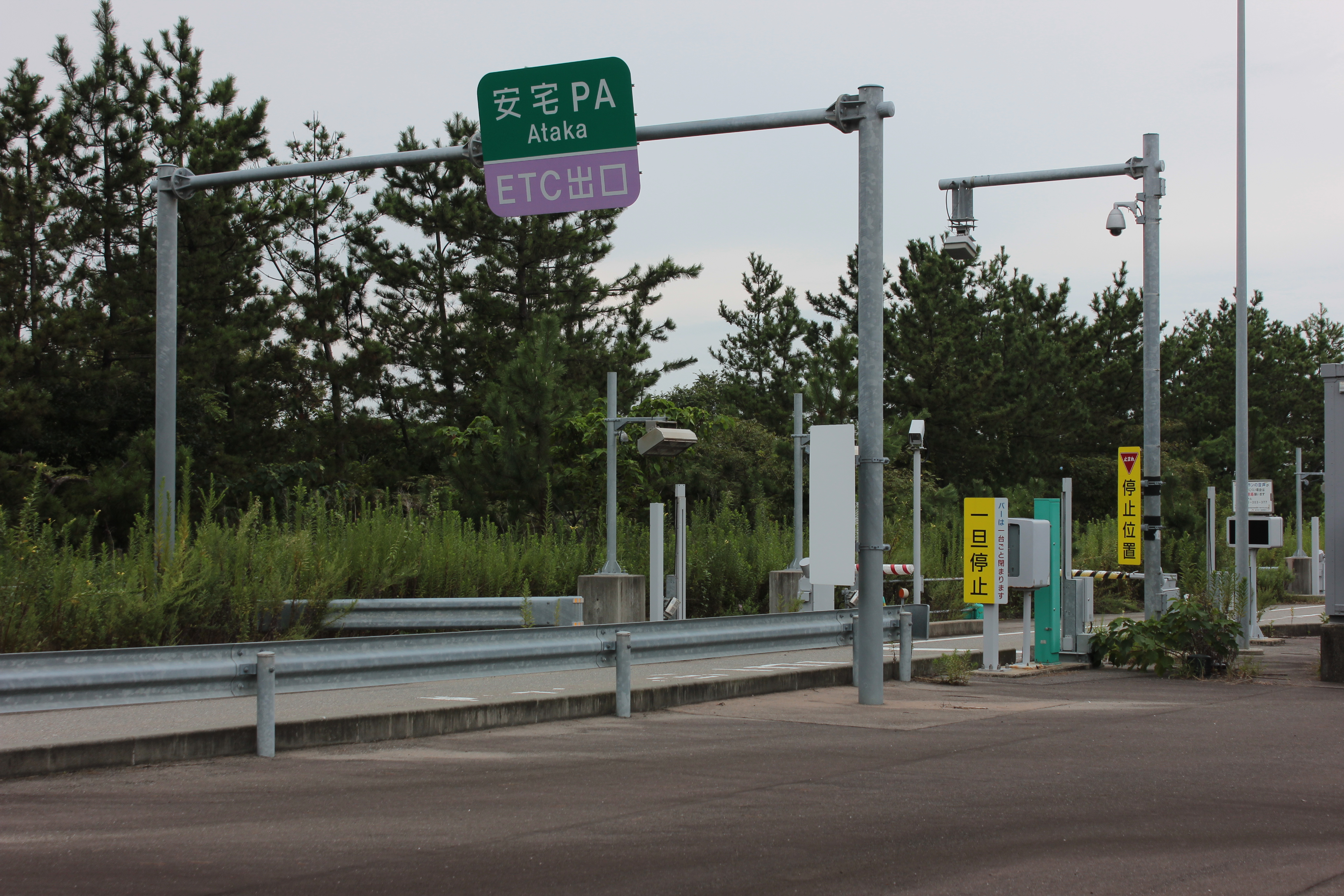 安宅パーキングエリアに併設している安宅スマートインターチェンジ（福井方面からの出口） Canon EOS Kiss X5